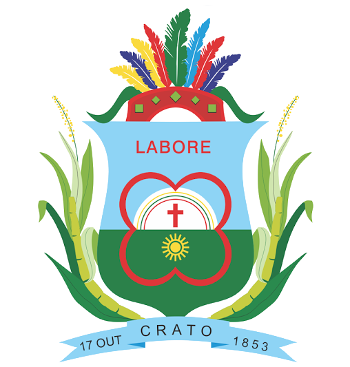 Brasão do Município do Crato